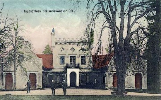 Jagdschloss Weißwasser um 1900, Innenhof mit Hauptportal, an den Seitenflügeln die separaten Eingänge der Jagdunterkünfte